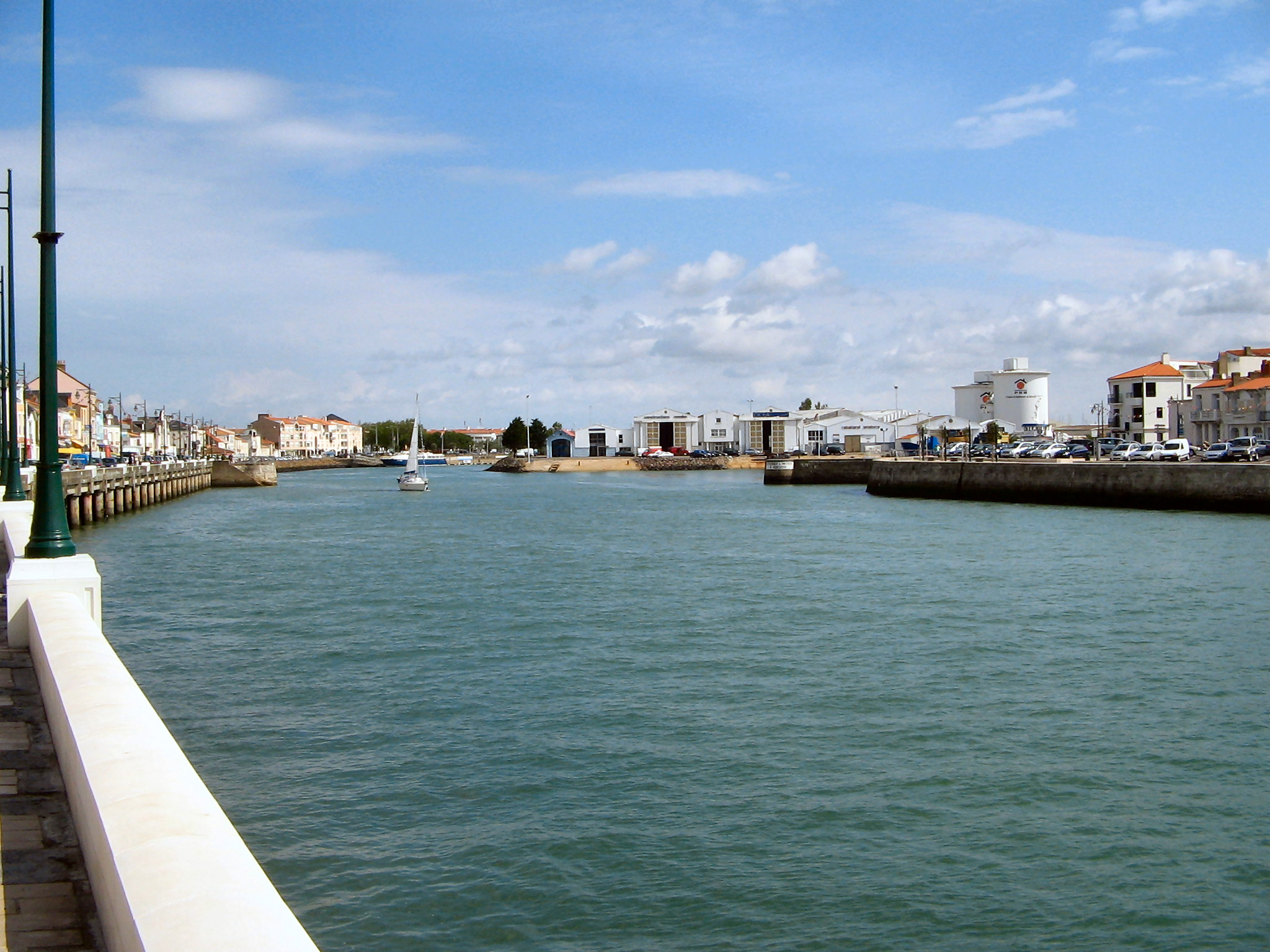 Le chenal du port des Sables d'Olonne en France (photo prise à partir du quartier de la Chaume